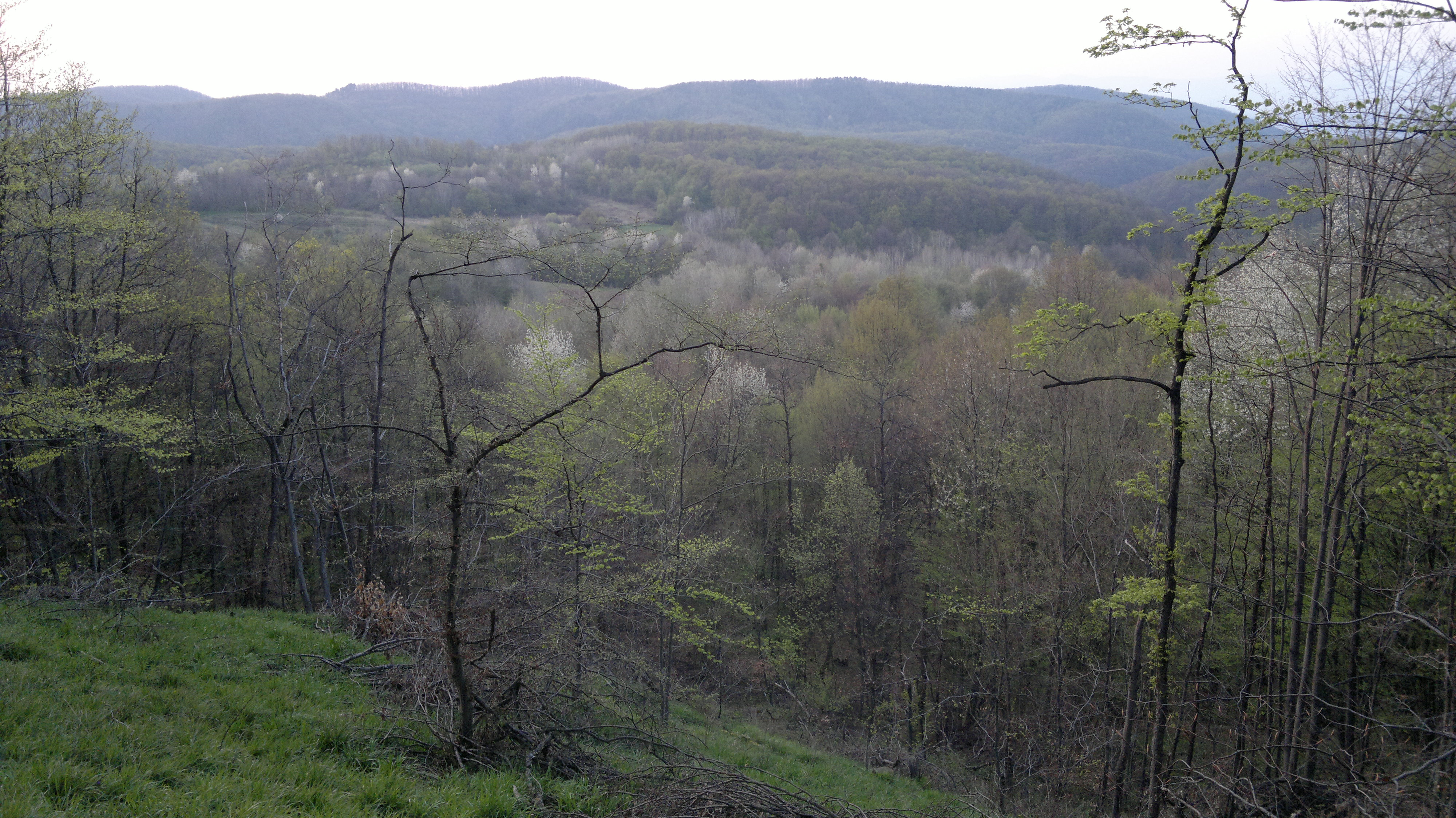 34000, Crkveni Vrhovci, Croatia